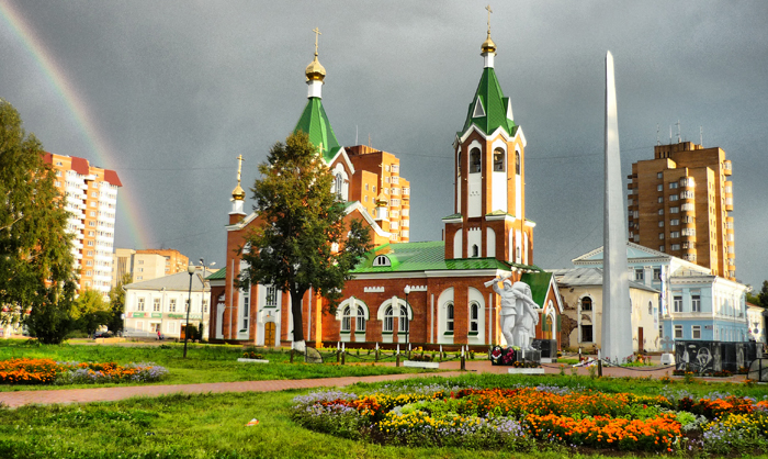 Центр Глазова. В центре фотографии Храм Преображения Господня